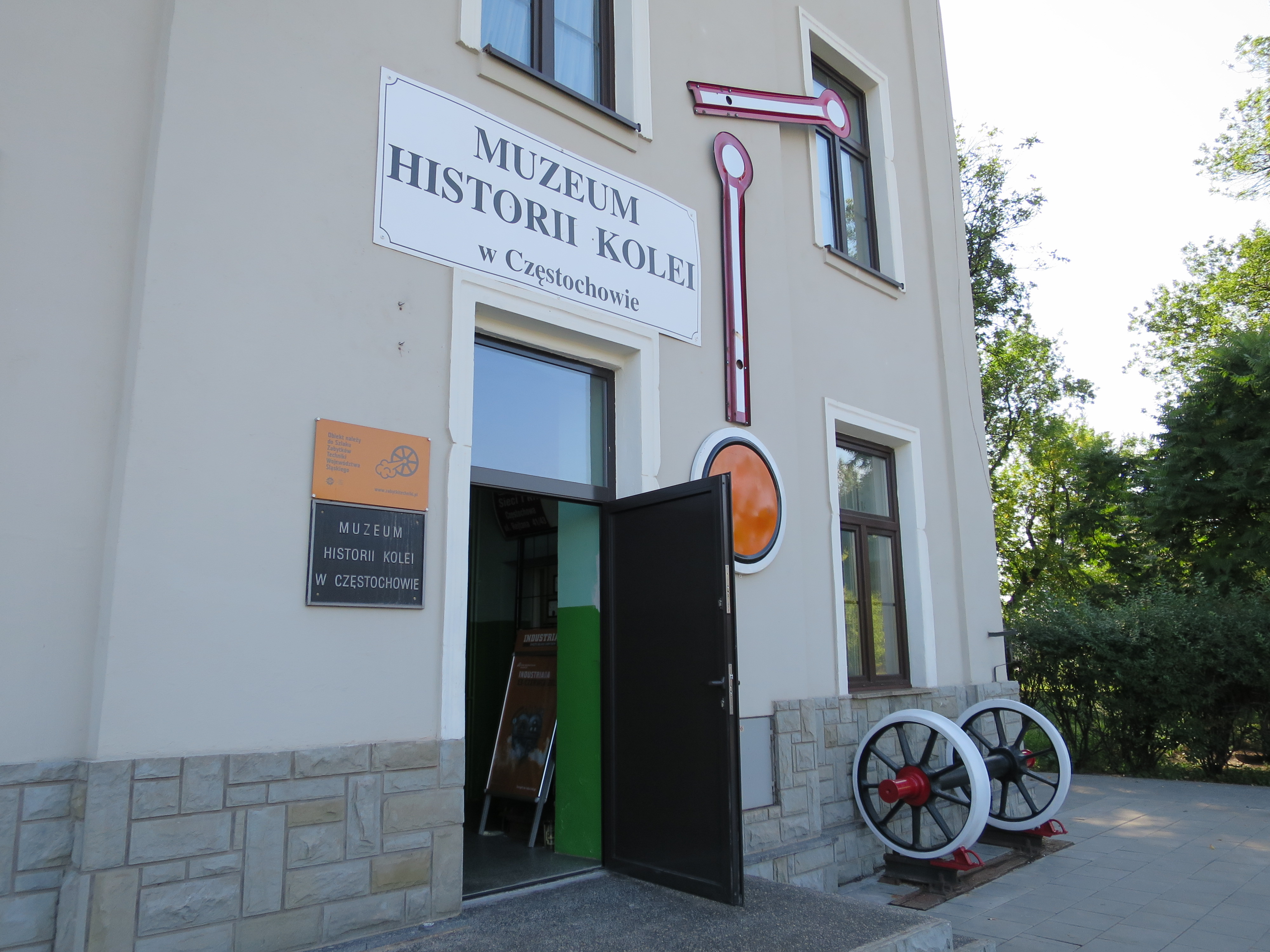 Muzeum Historii Kolei w Częstochowie This photo was taken during Railway Wikiexpedition 2015 set up by Wikimedia Polska Association in cooperation with Fundacja Grupy PKP. You can see all photographs in category Wikiekspedycja kolejowa 2015.